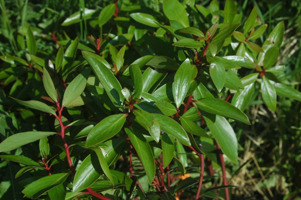 Tasmannia lanceolata [syn. Drimys lanceolata]